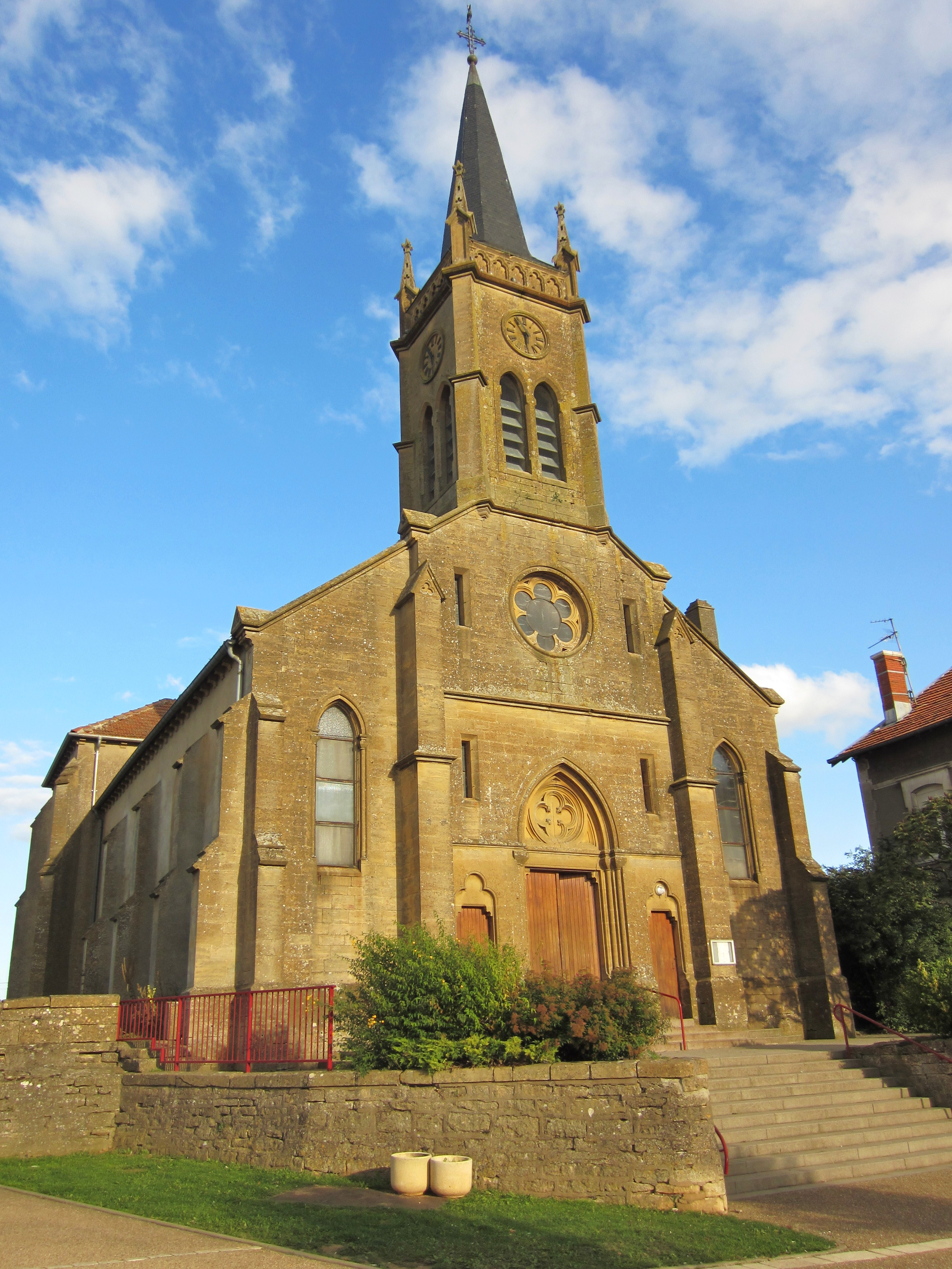 Description eglise Landres 54 eglise Landres 54